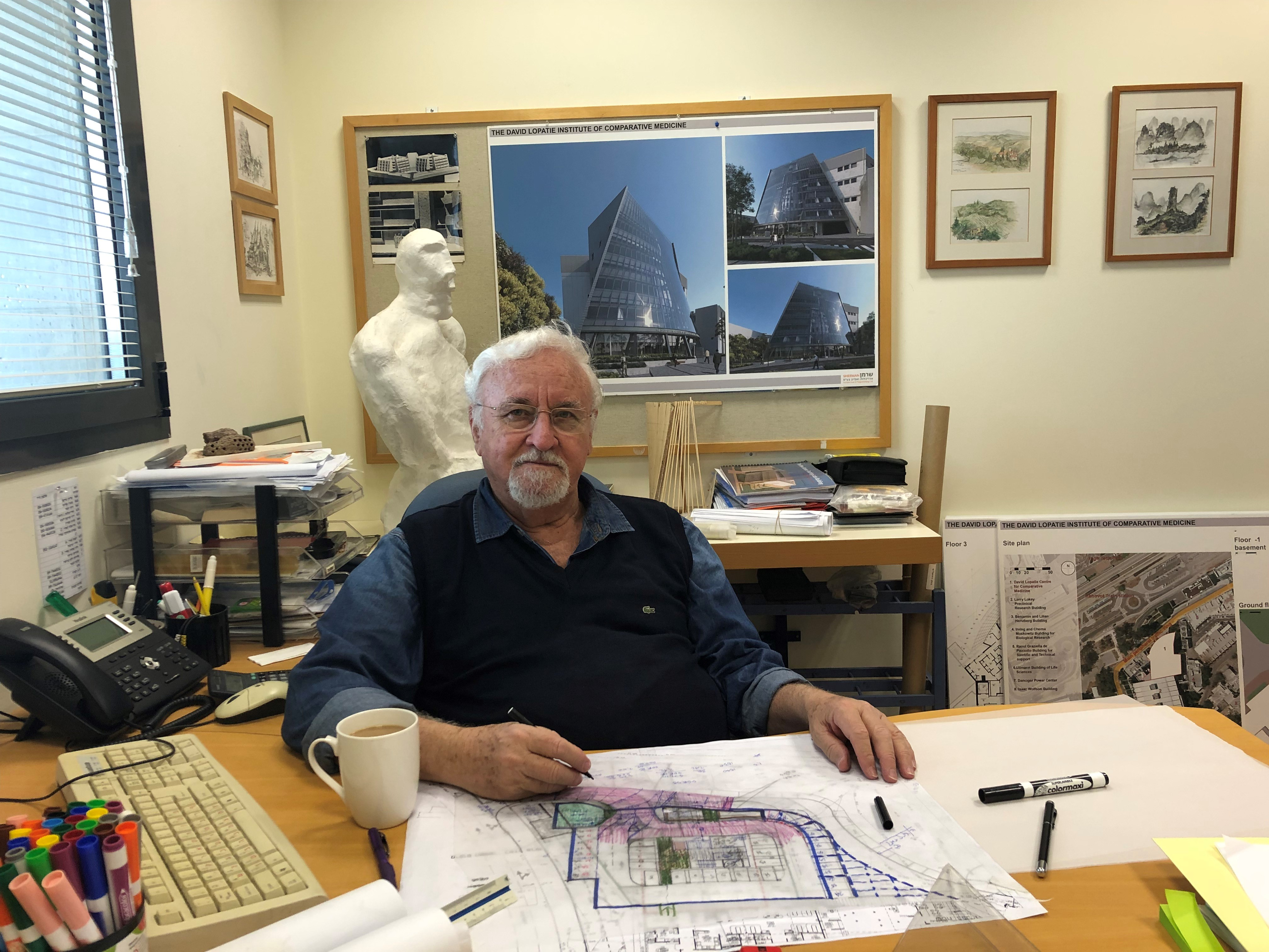 אדריכל צדוק שרמן